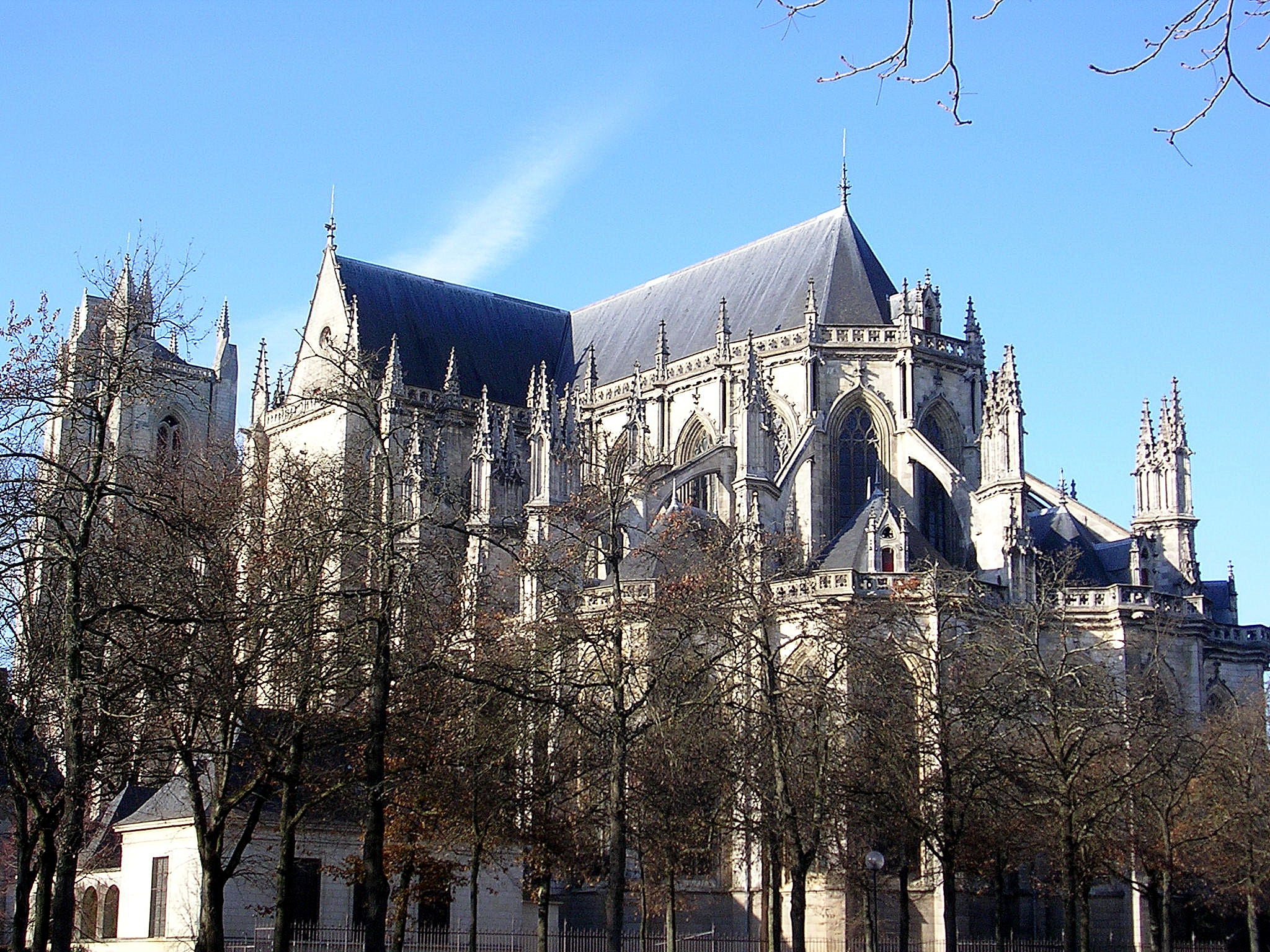 Cathédrale de Nantes vue du Cours St Pierre. Photo prise par Jibi44